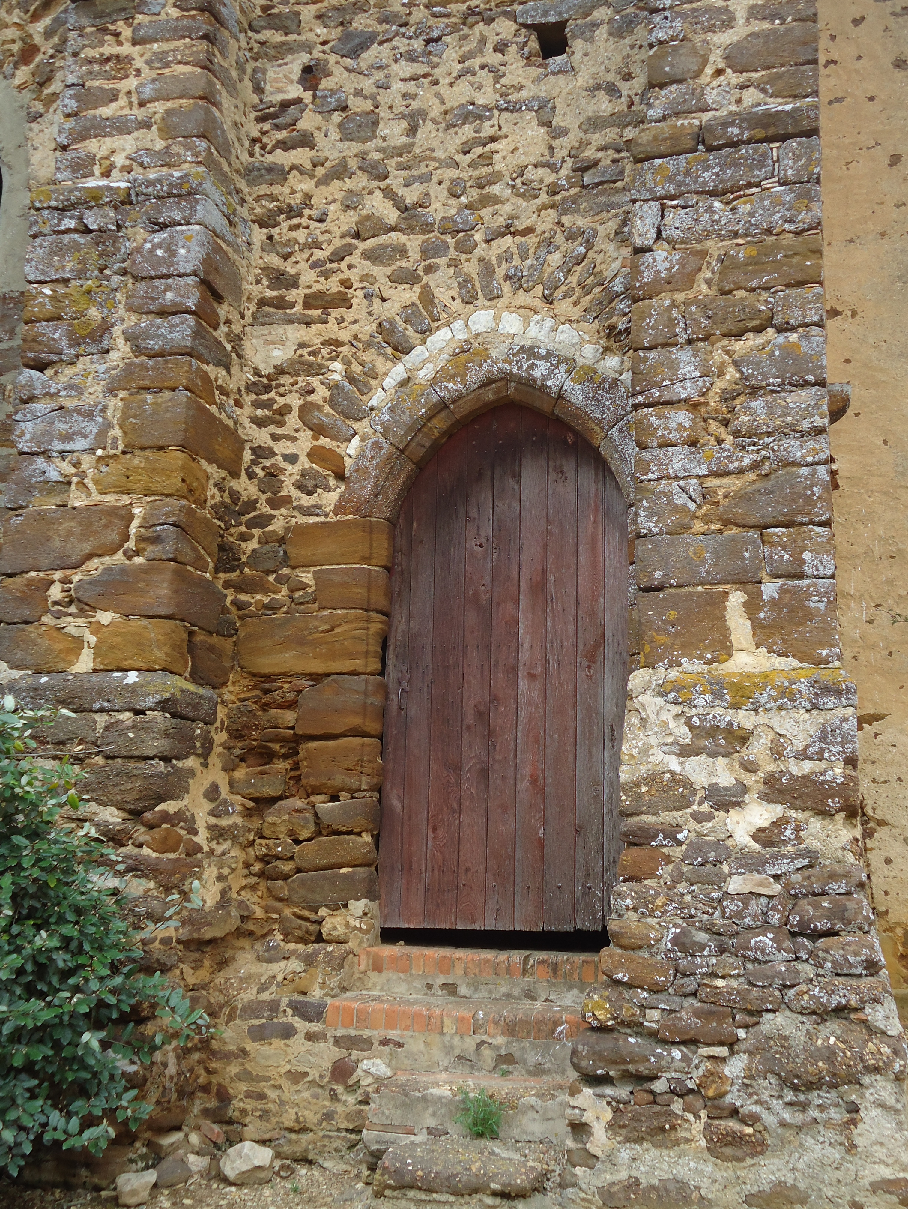 Détail - Manoir de la Perrière - Voivres-lès-le-Mans - Sarthe (72)